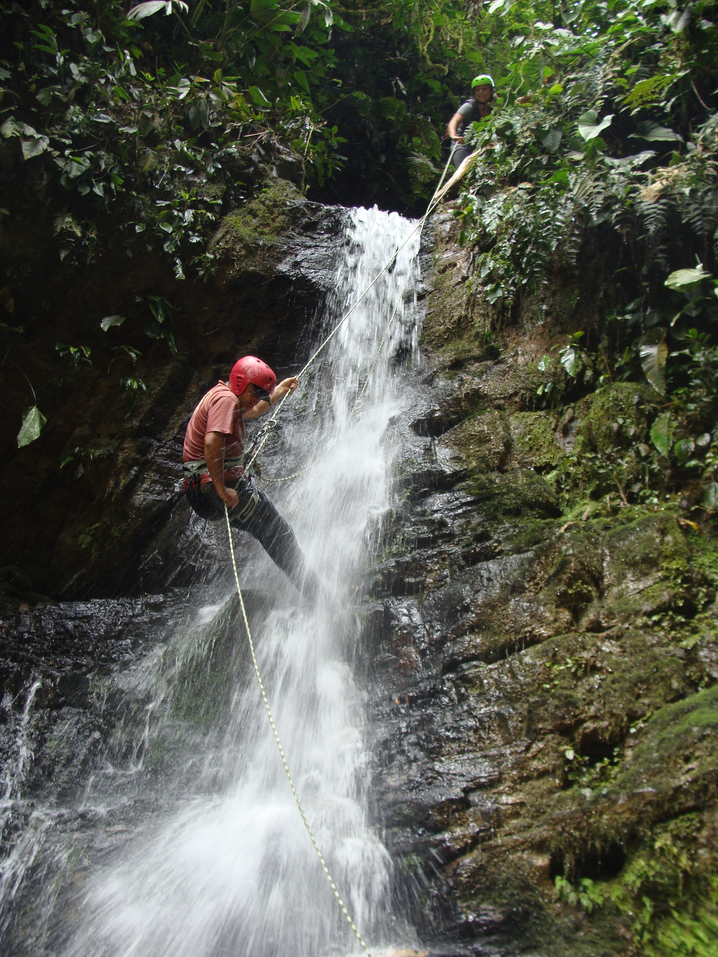 Canyoning o descenso en Cascadas del valle misterioso, Huambi, Sucua, Ecuador